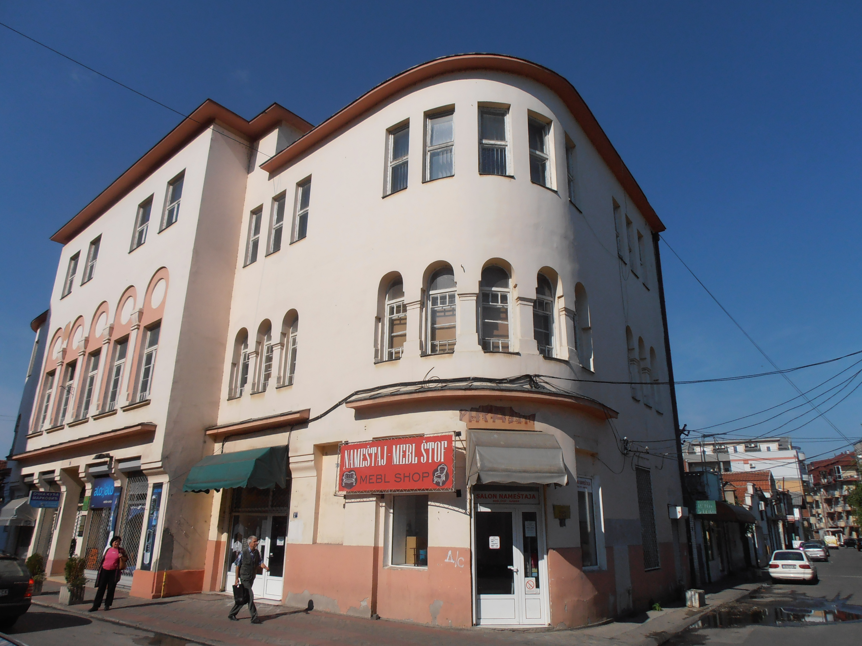 Зграда Радничког универзитета у Јагодини, у улици Максима Горког бр.1